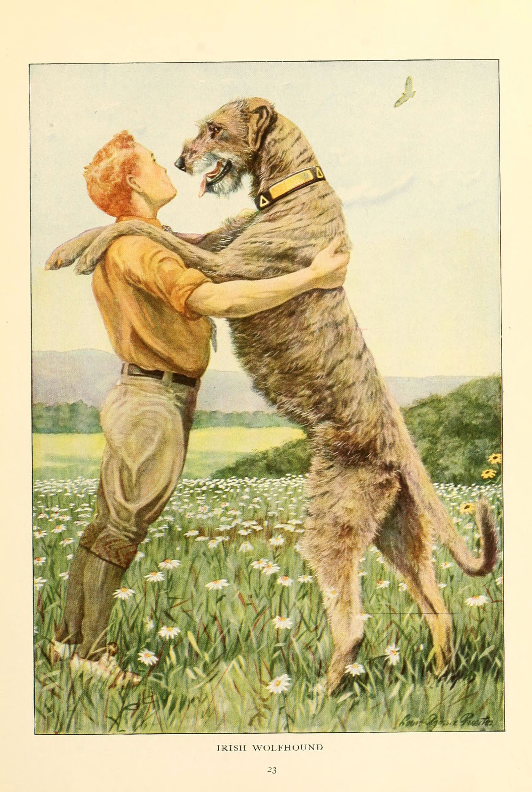 The book of dogs Washington, D. C.,The National geographic society[c1919]